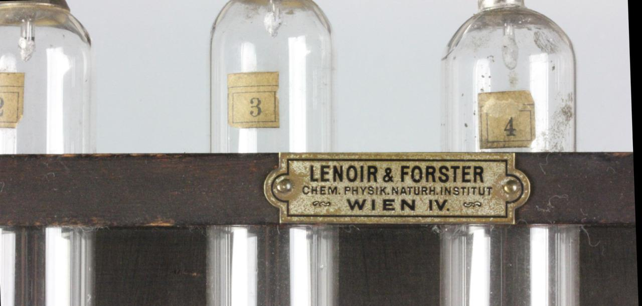 Firmenschild Lenoir & Forster mit Glaskolben